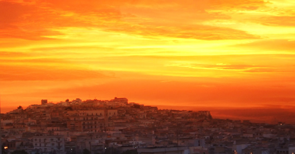 Canosa di Puglia, Bari, Italy